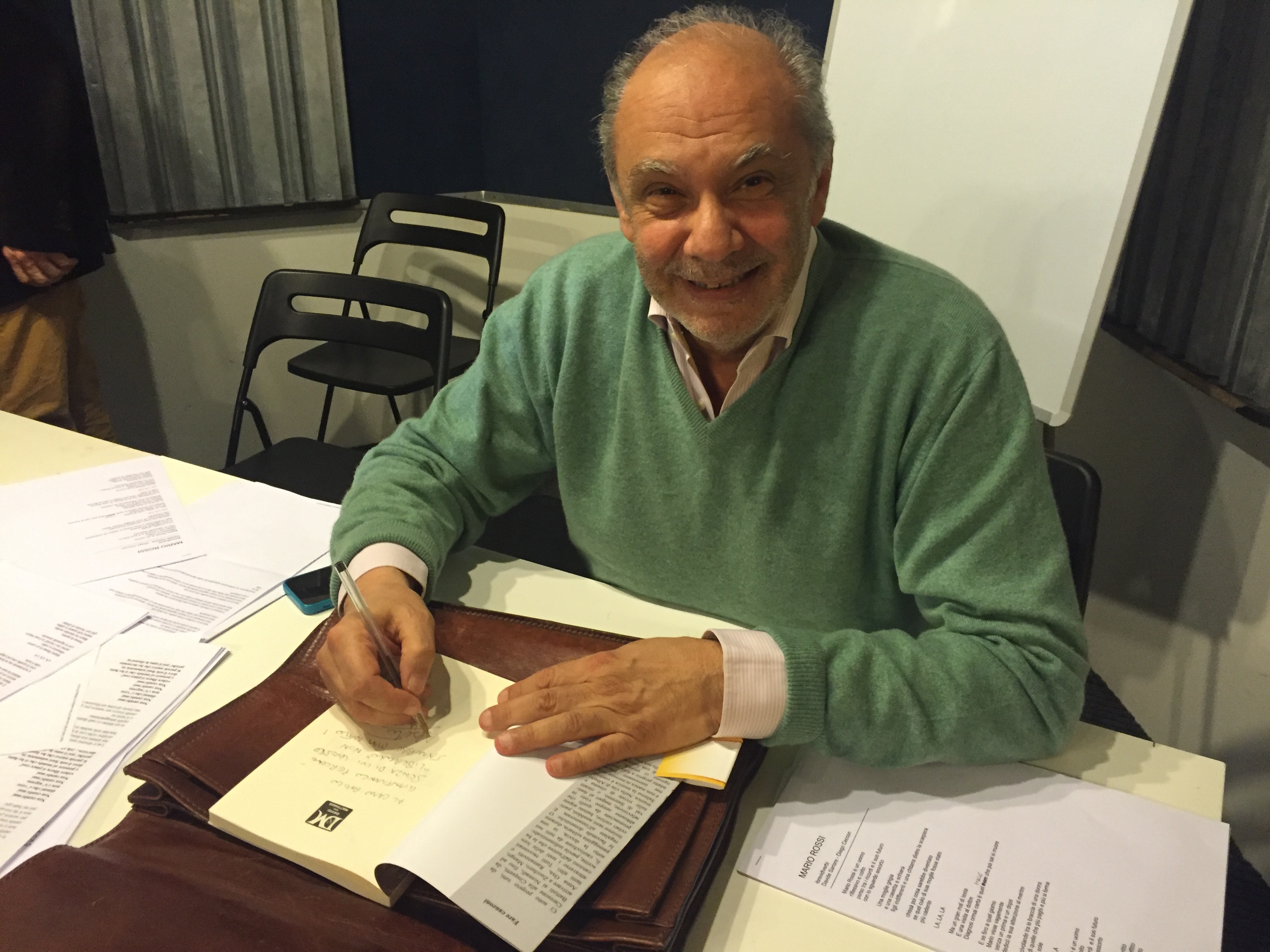 Foto di Alberto Salerno